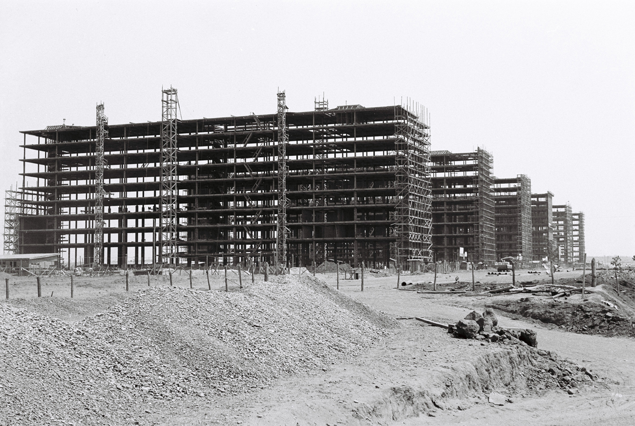 Construção dos edifícios ministeriais em Brasília